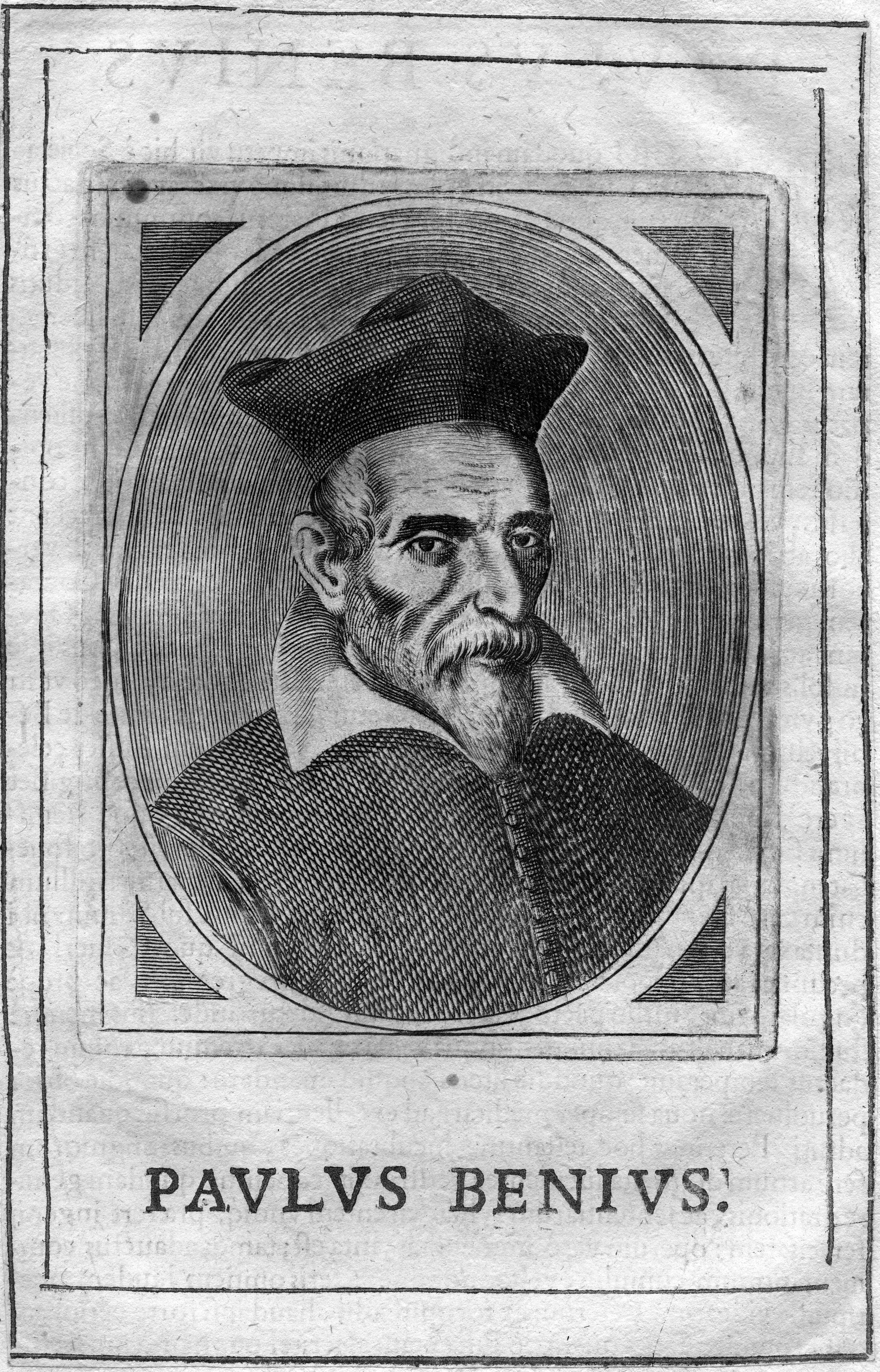 portrait gravé